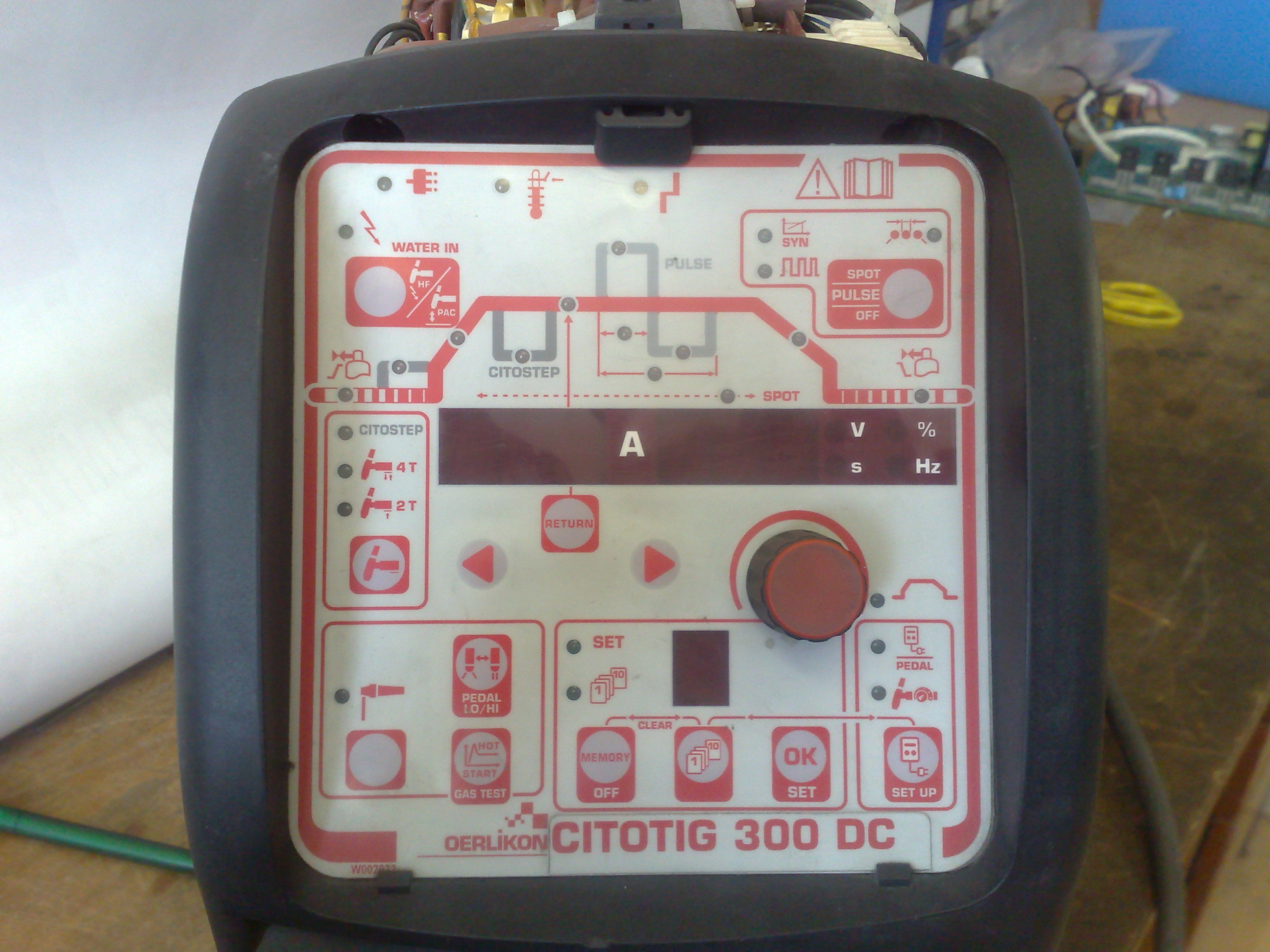 TIG varilni aparat - čelna plošča.